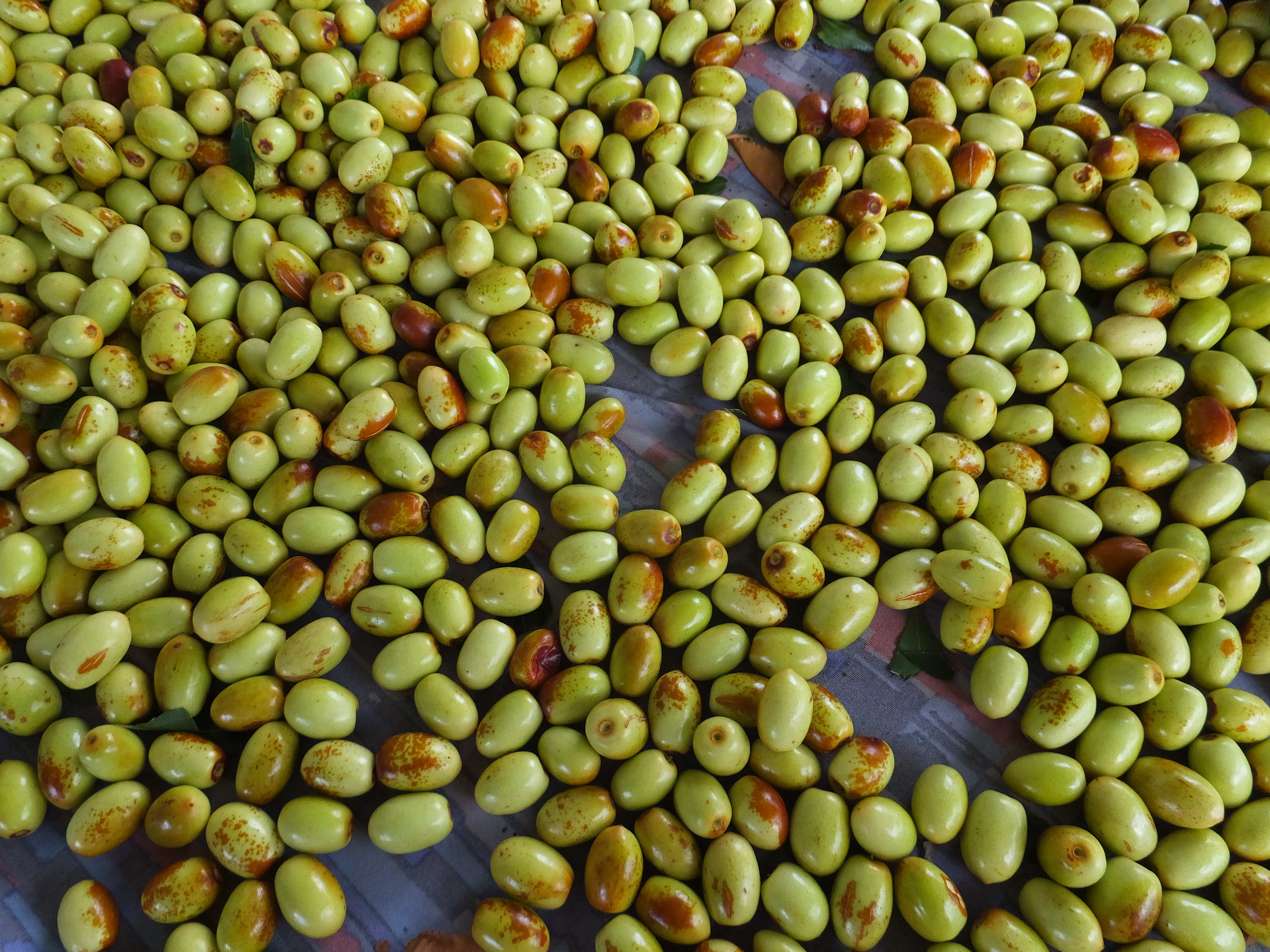 紅棗 Jujubes